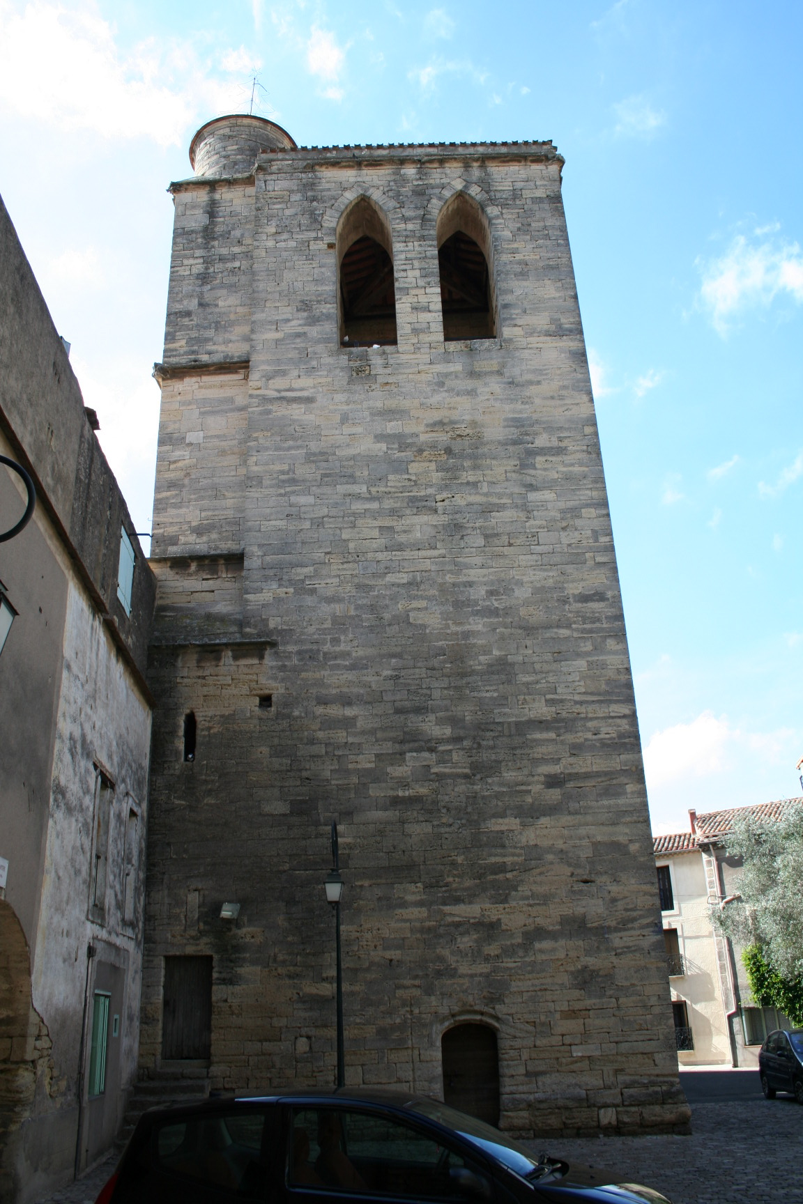 Saint-Thibéry (Hérault) : Tour-clocher à l'entrée de l'abbaye, construite entre 1520 et 1530. Auteur : Fagairolles 34